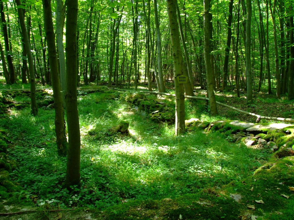 Die Reste(Fundament) eines Wohnhauses in der Wüstung Hohenrode